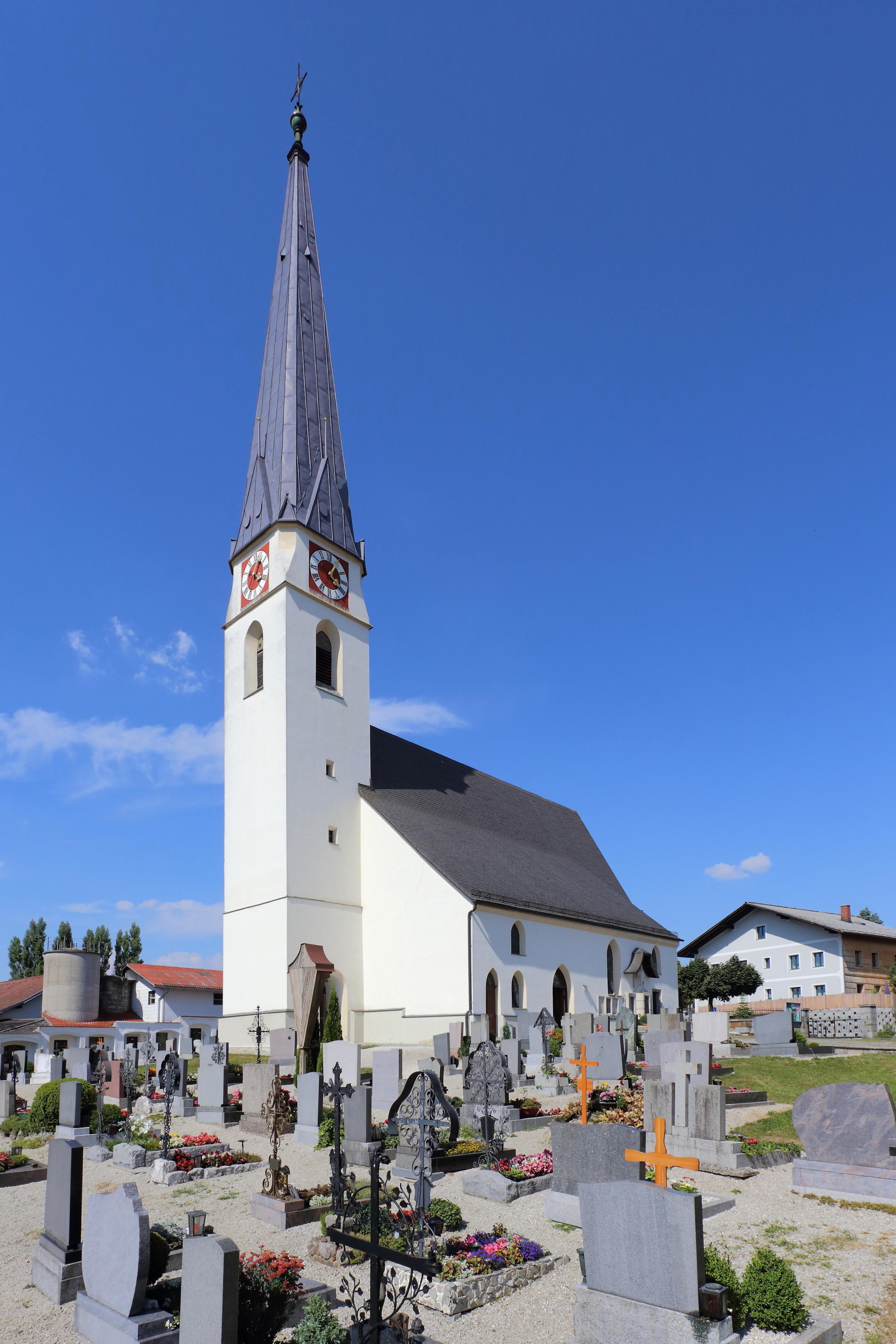 Katholische Pfarrkirche hl. Laurentius in der oberösterreichischen Gemeinde Pattigham. Ein spätgotischer einschiffiger Sakralbau mit einem eingezogenen dreijochigen Chor. Der barocke Hochaltar stammt aus der Werkstätte von Thomas Schwanthaler. Dieser wurde ursprünglich für die Wallfahrtskirche Sankt Thomas um 1665/70 errichtet und im Zuge der Josephinischen Reformen um 1787 in die Laurentiuskirche übertragen.